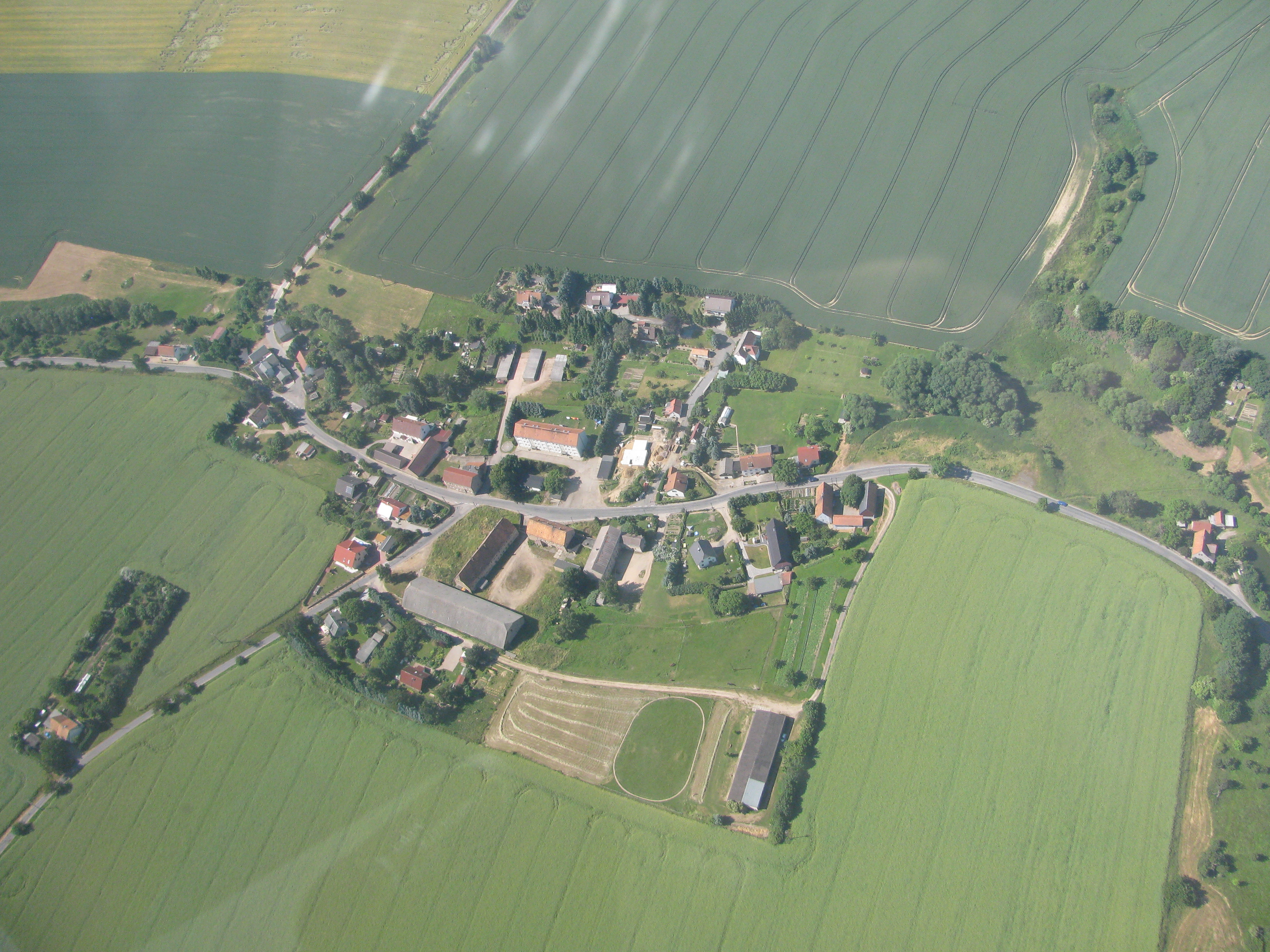 Luftbild Triebischtal-Piskowitz